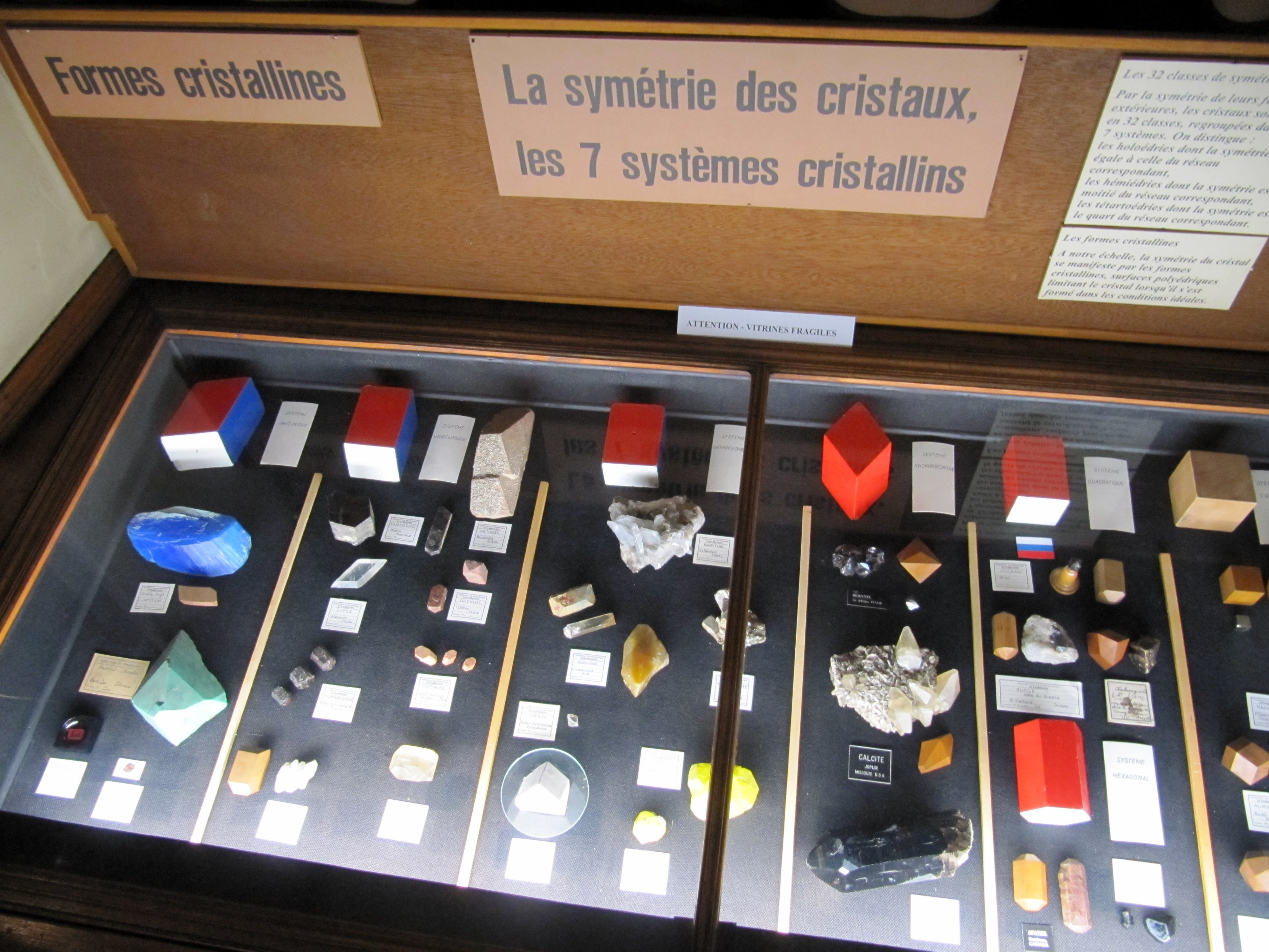 Musée de minéralogie